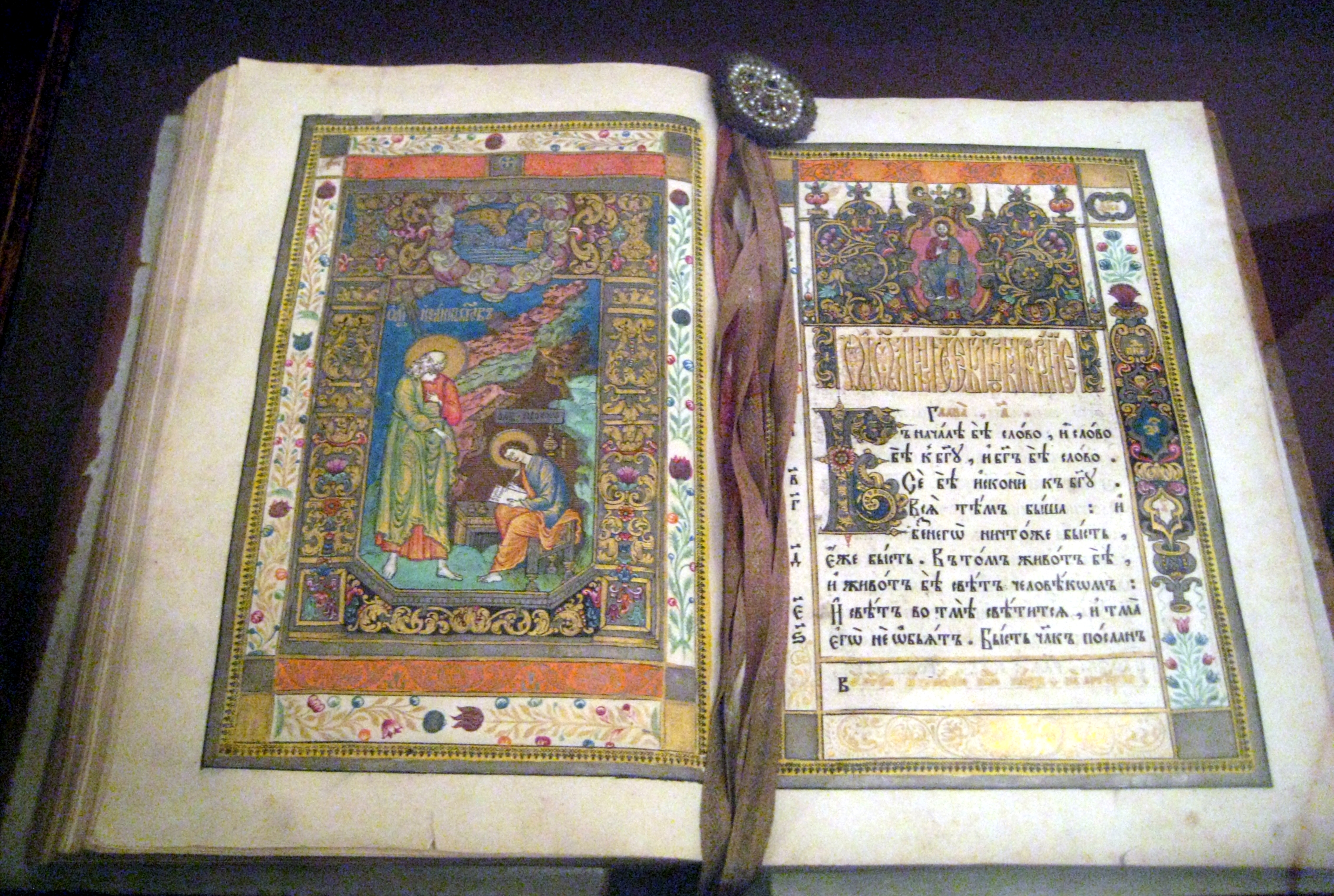 Евангелие